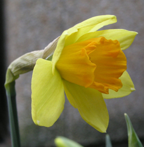 narcis, eigen foto Bart van Herk 2004